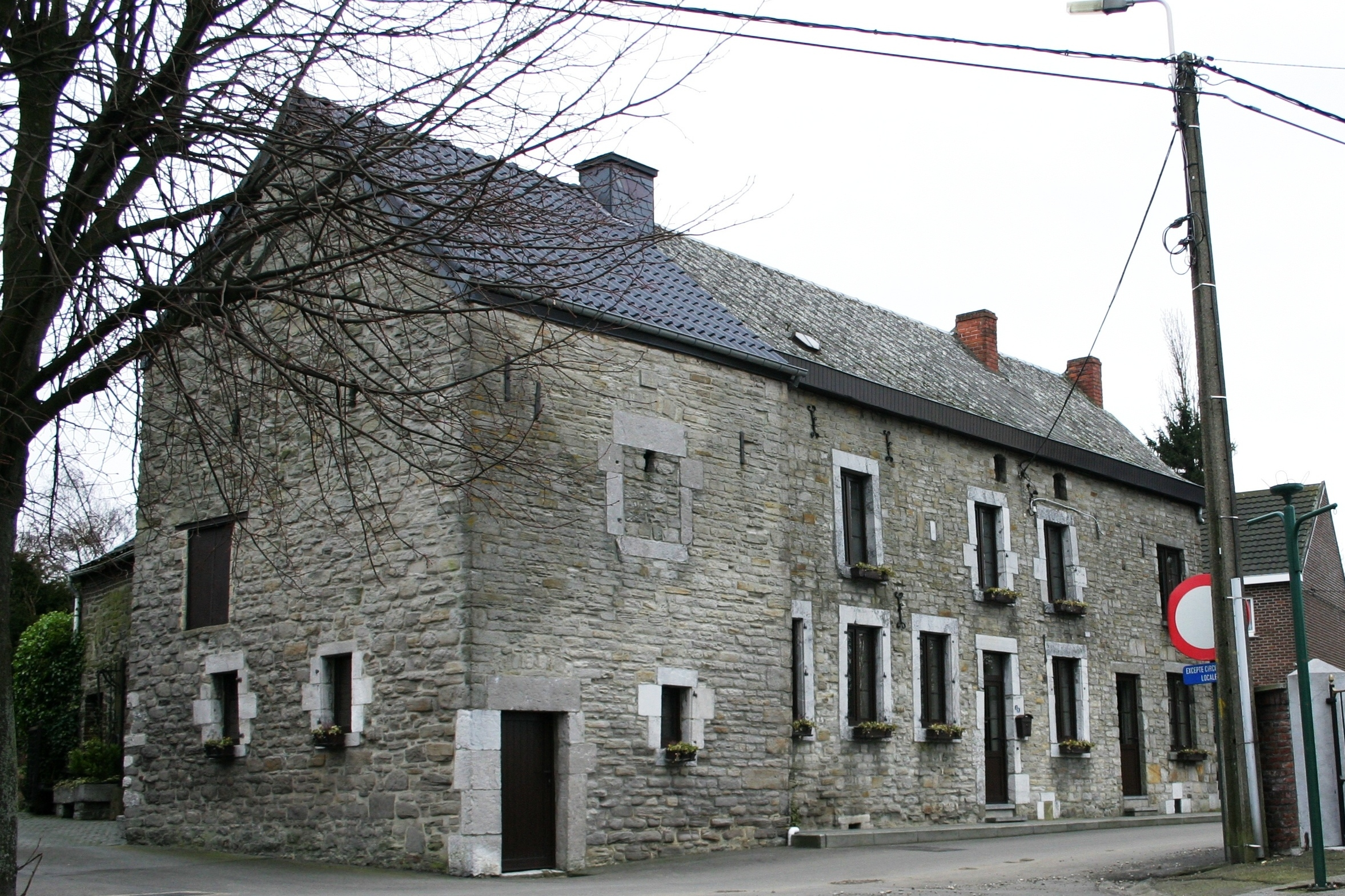 Aalt Haus am Zentrum vu Tignée.